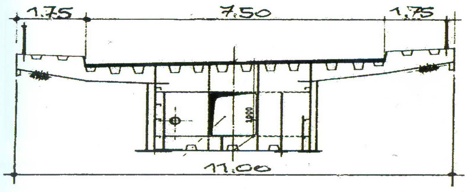 Querschnitt des Brückenbaus der Abt-Fulrad-Brücke bei Auersmacher, Gemeinde Kleinblittersdorf (Risszeichnung ohne Schöpfungshöhe)